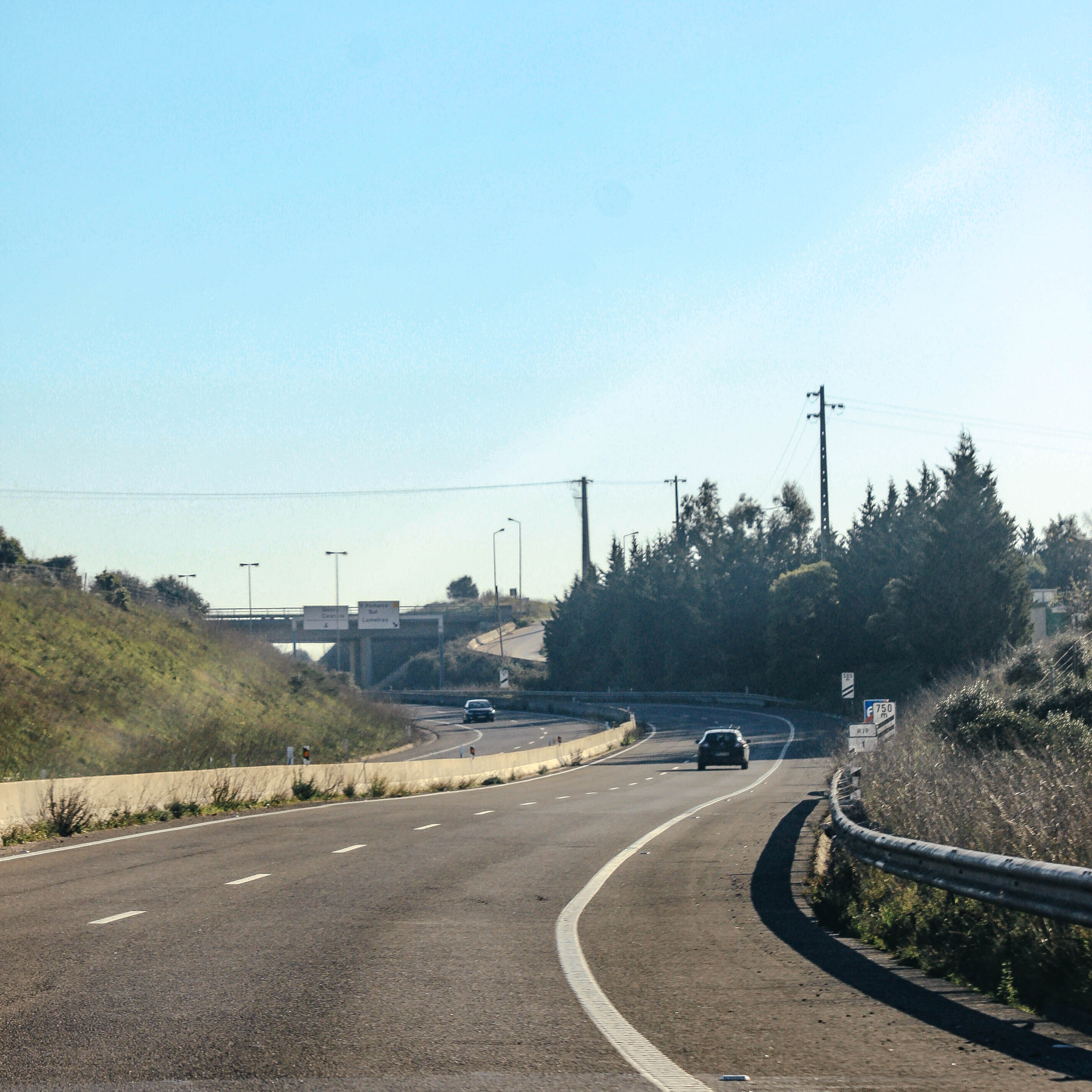 EN9 em Pero Pinheiro, onde adquire um perfil de autoestrada, já em antecipação da futura Via de Cintura da Área Metropolitana de Lisboa.